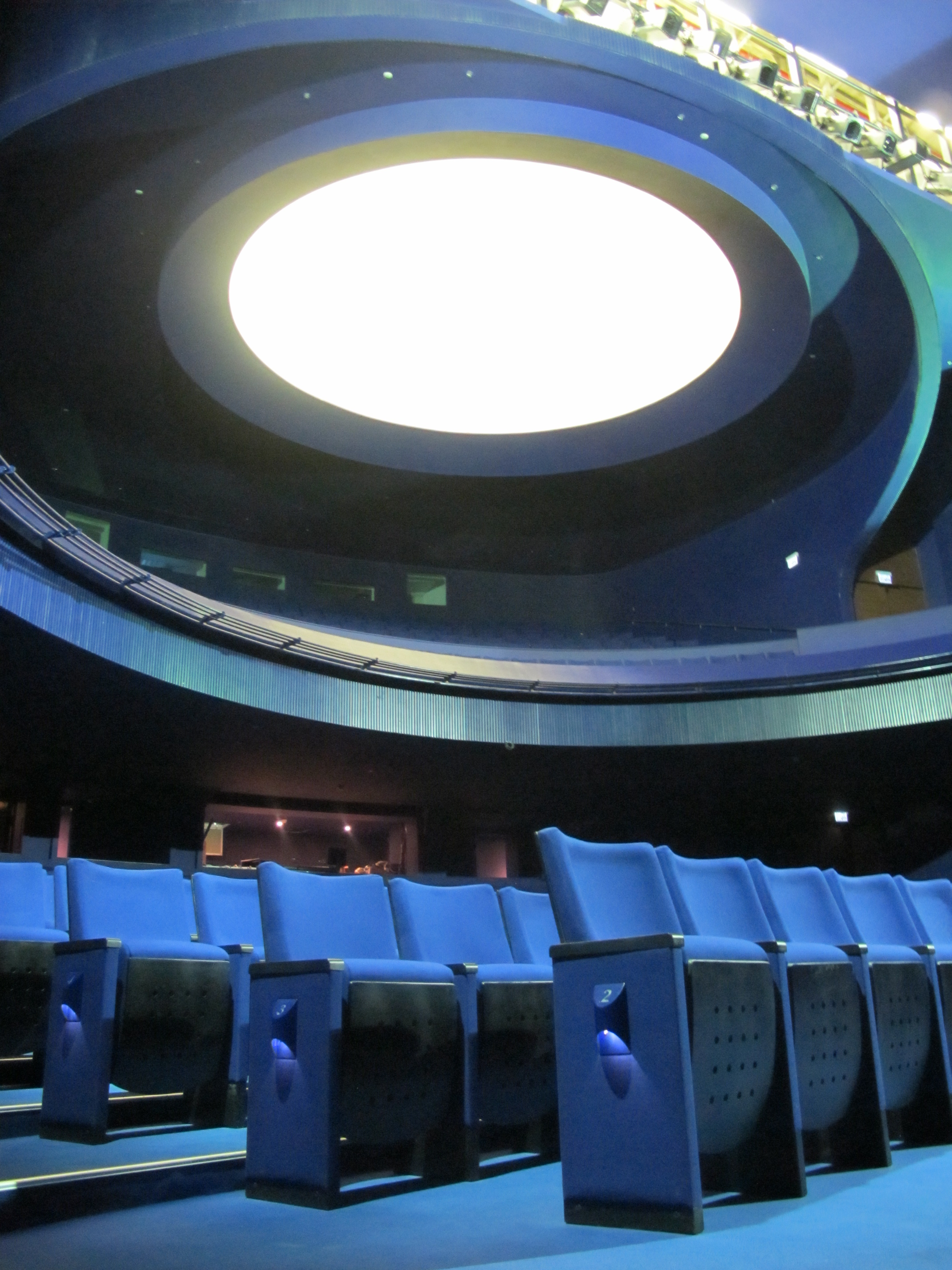 אולם רובינא המחודש בבניין תיאטרון הבימה - אדריכל: רם כרמי